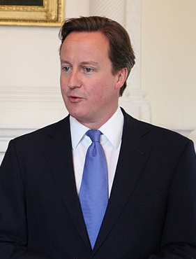 David Cameron. Photo coupé d'une autre photo sous licence libre